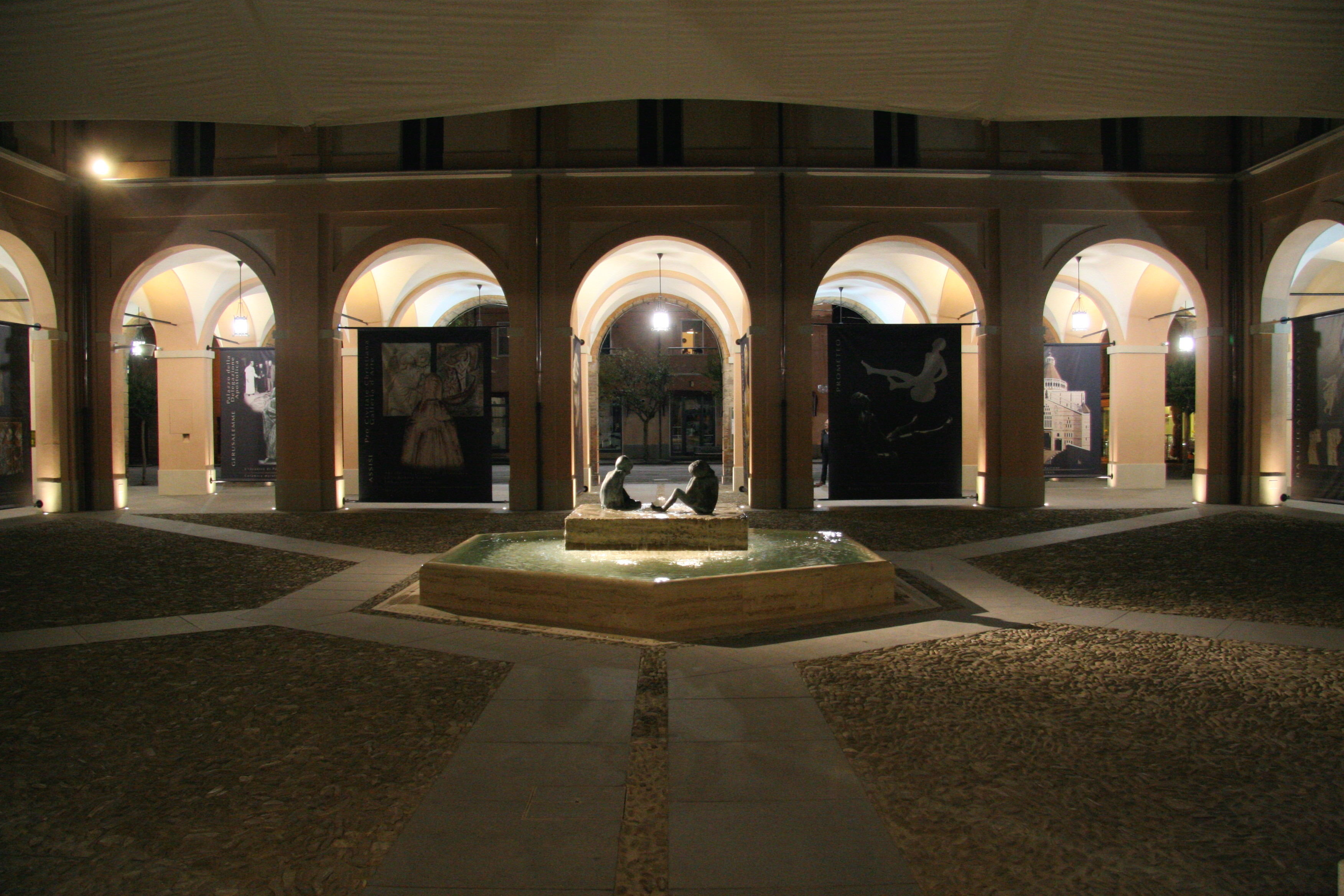 Palazzo municipale - palazzo Mengoni This is a photo of a monument which is part of cultural heritage of Italy.